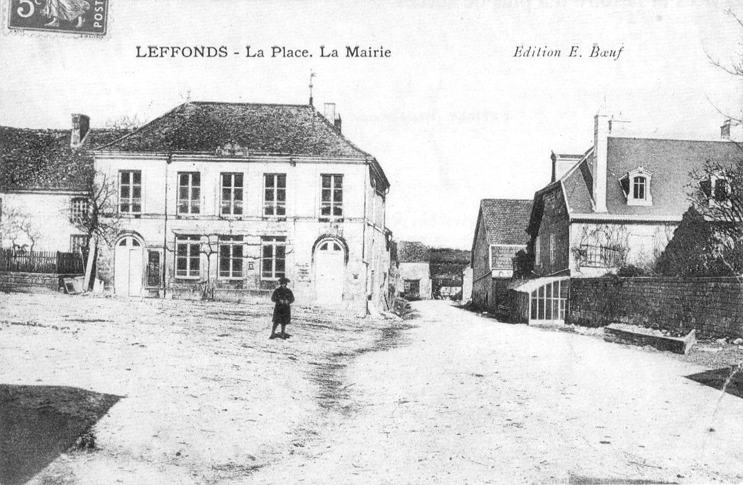 Carte postale ancienne La place et la mairie de Leffonds, Haute-Marne, France